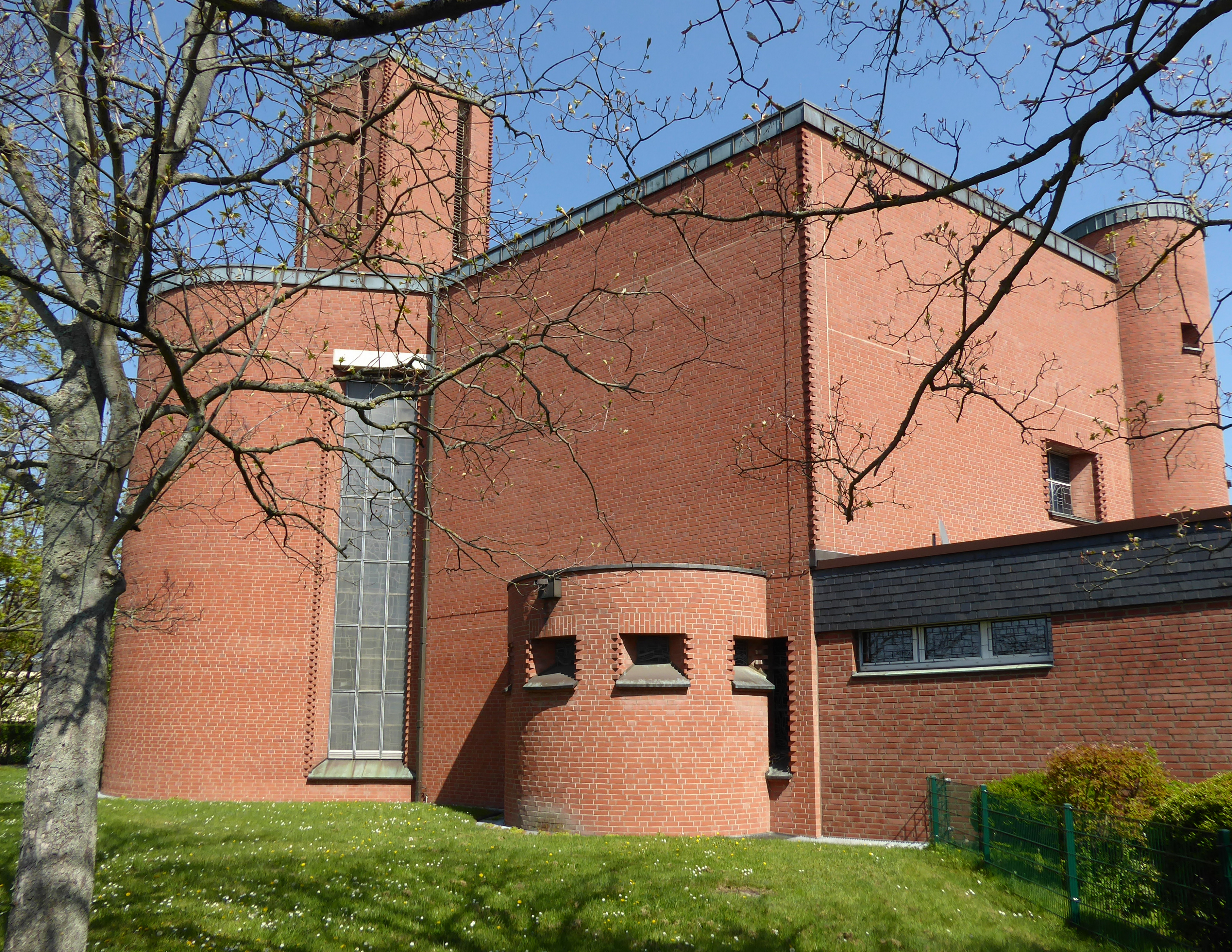 St. Mariä Namen (Köln-Esch)